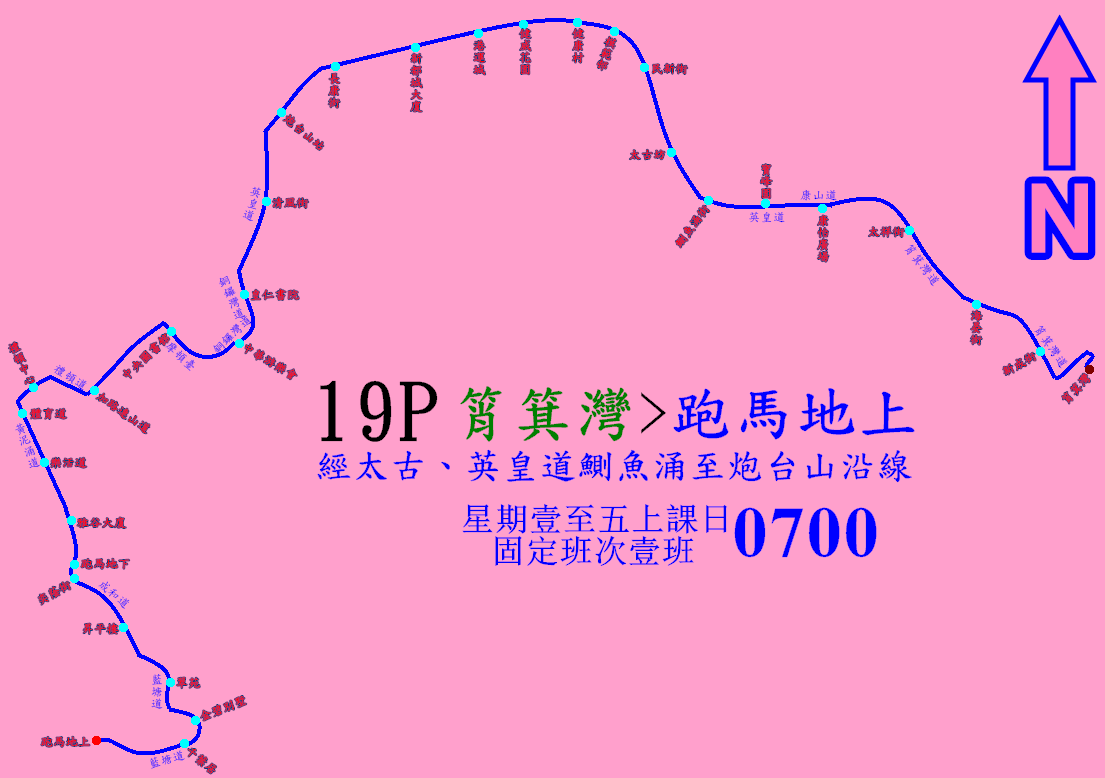 中文（香港）: 城巴19P線的走線圖